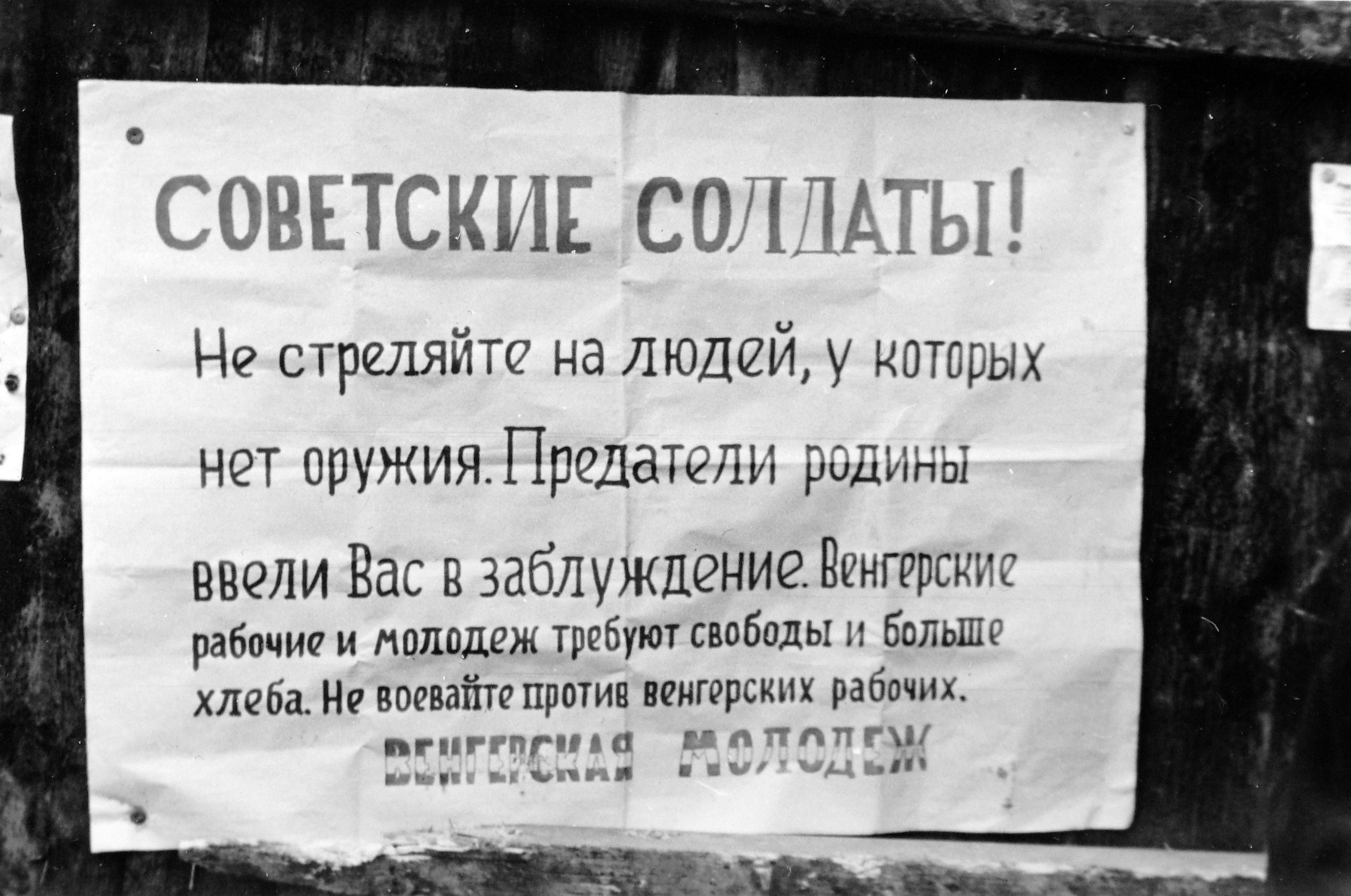 SZOVJET KATONÁK NE LŐJETEK!.... Röplap az 1956-os magyar forradalom időszakából, amely a Magyarországra zúduló Операция «Вихрь» elnevezésű hadművelet harcoló szovjet katonáinak szól orosz nyelven.